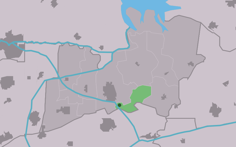 Kaartsje fan himrik fan Lytsewâld